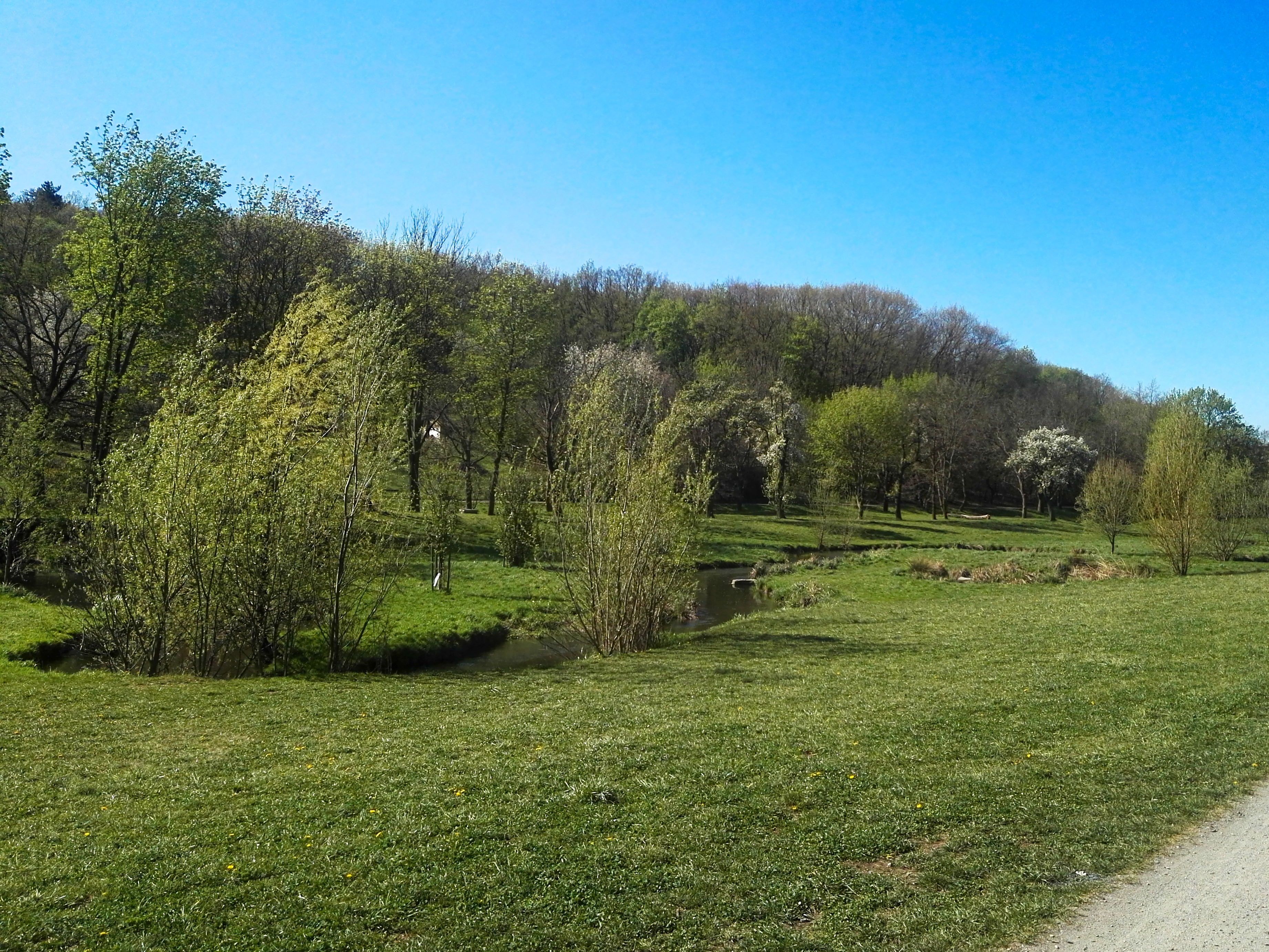 Vrch Smetanka v Praze-Hrdlořezích, pohled k vrcholu přes Rokytku od severovýchodu